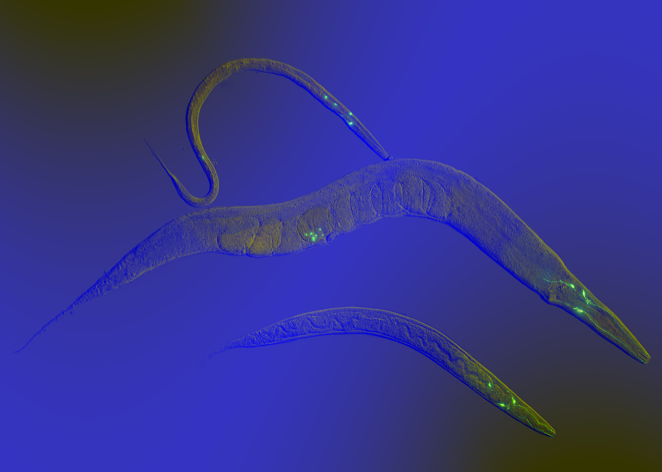 Pildil on kujutatud erinevates arengustaadiumides varbusse (C. elegans), kelle kolme neuronisse on viidud GFP (green fluorescent protein), et visualiseerida nende neuronite arengut ussikeses. Mikrofoto, fluorestsents + diferentsiaalne interferentskontrast. See pilt on fotokonkurssi Teadusfoto 2007 võitja.